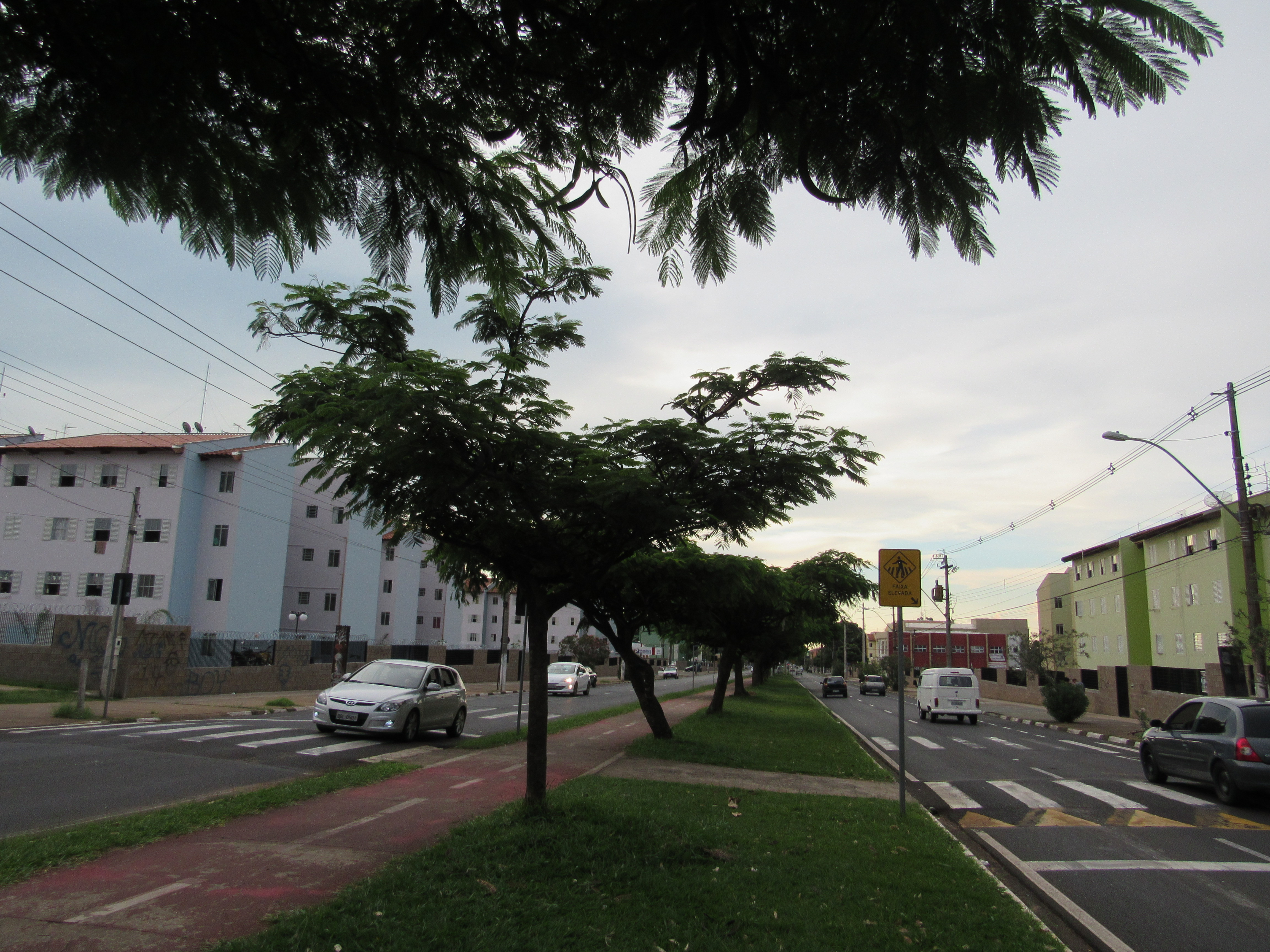 Av. Dr. Abrahão Brickmann, Parque Vicente Leporace I, Franca (SP), Brasil (12-01-2019)